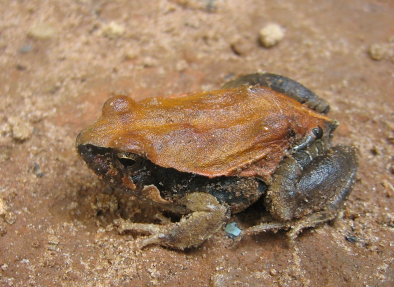 Physalaemus centralis